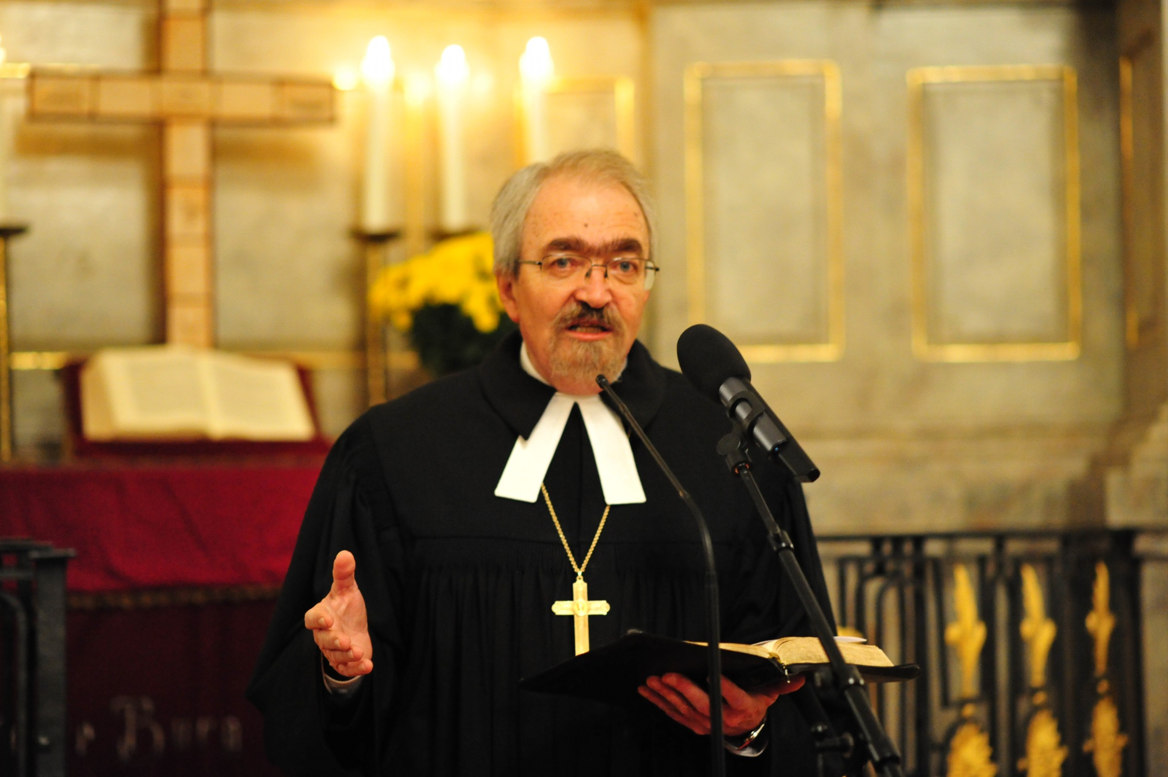 Der burgenländische Superintendent Manfred Koch beim Ökumenischen Gottesdienst in der evangelischen Kirche in Rust.